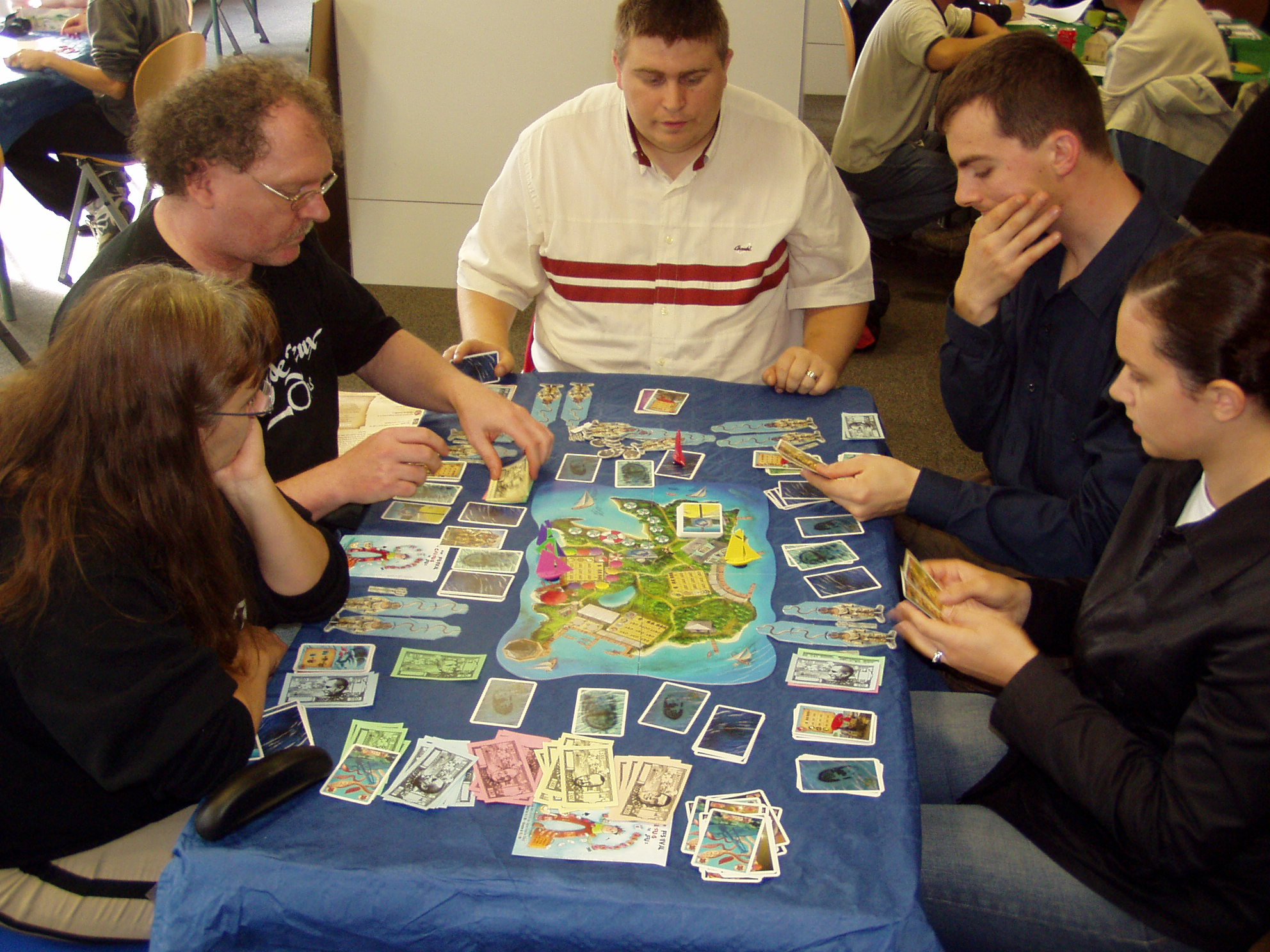 Une partie de Key Largo à Grenoble. Photo prise par François Haffner